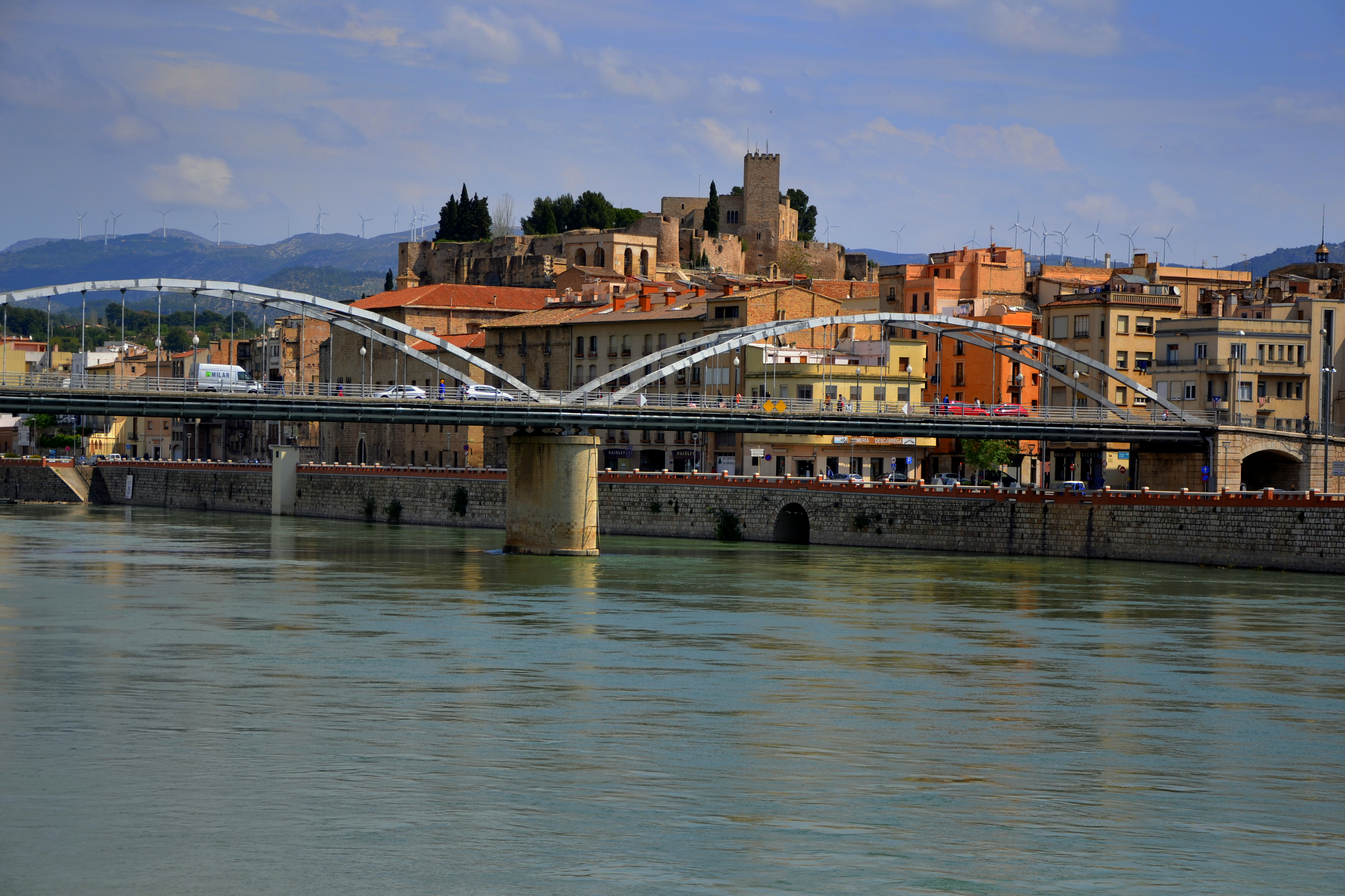 Tortosa, riu Ebre i la Suda